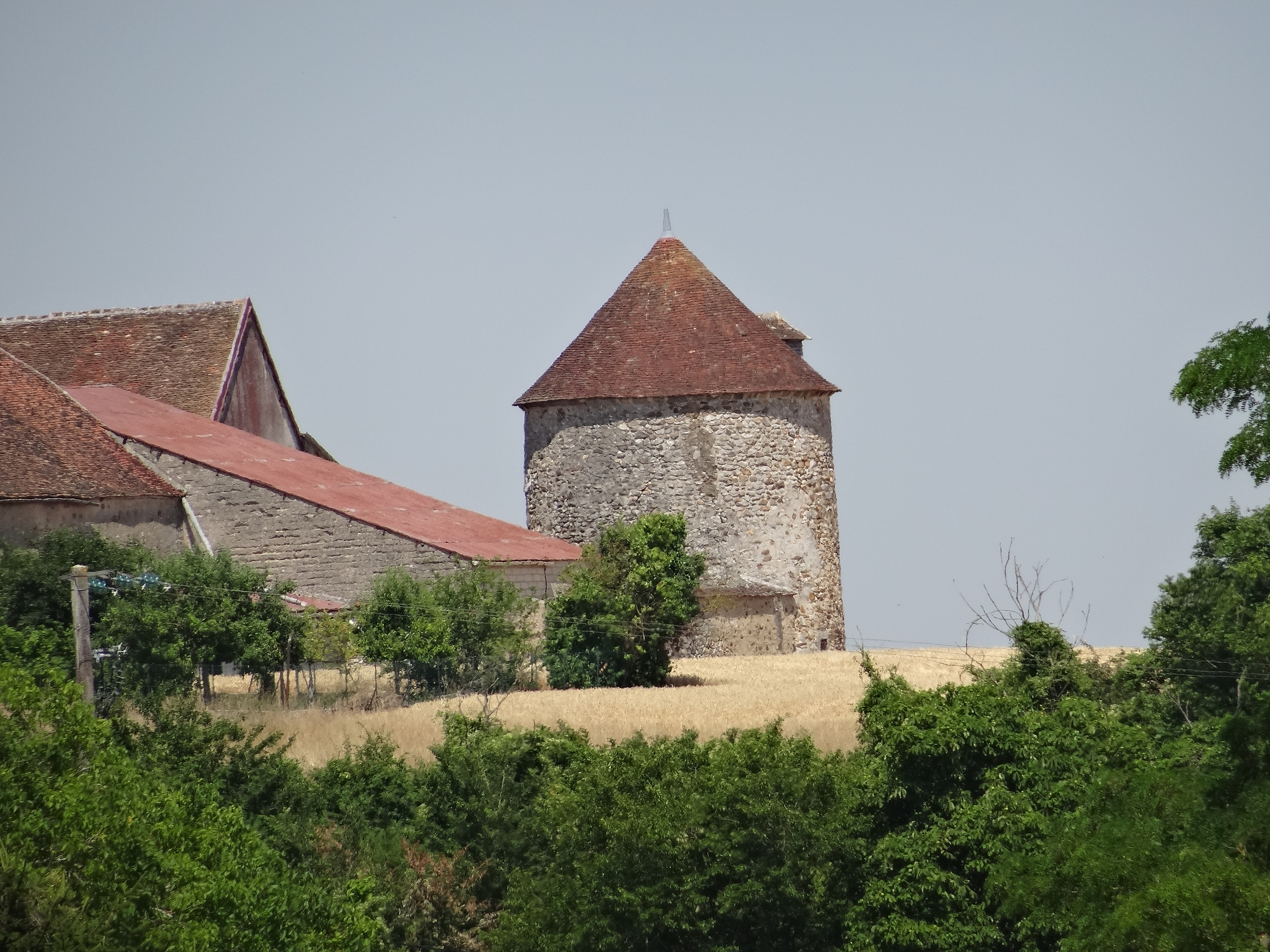 Pigeonnier de Courtioux. (Commune de la Saulsotte, Aube, région Champagne-Ardenne).